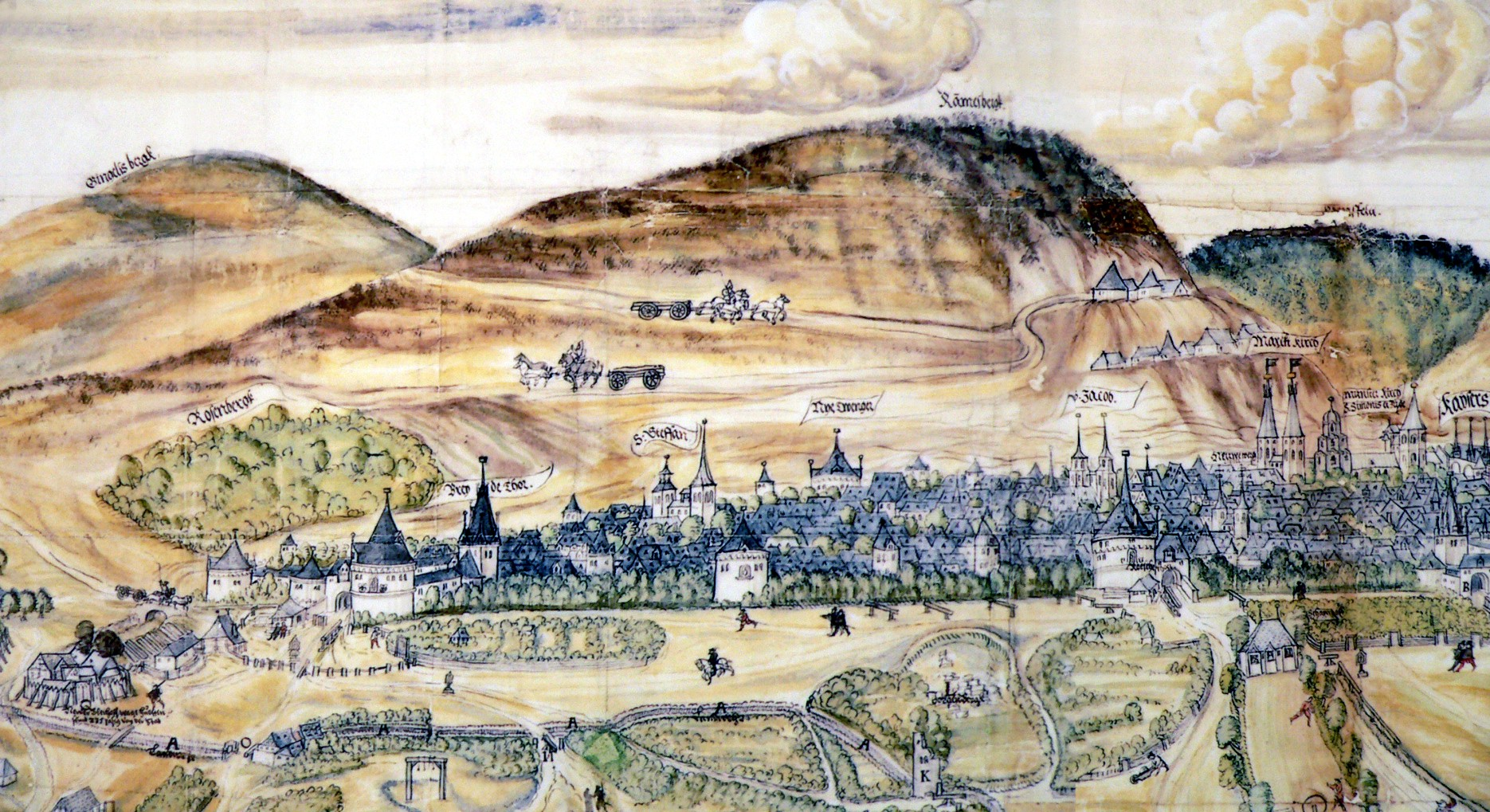 Bildkarte von Goslar und dem Rammelsberg